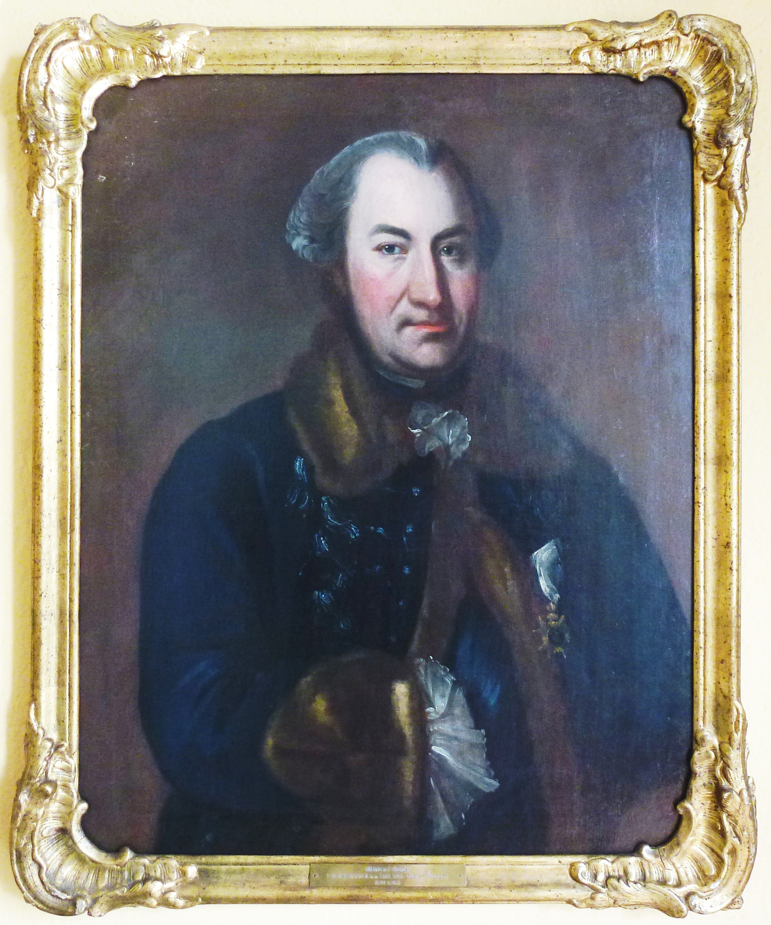 Ture Gustaf Rudbeck (1714-1786)